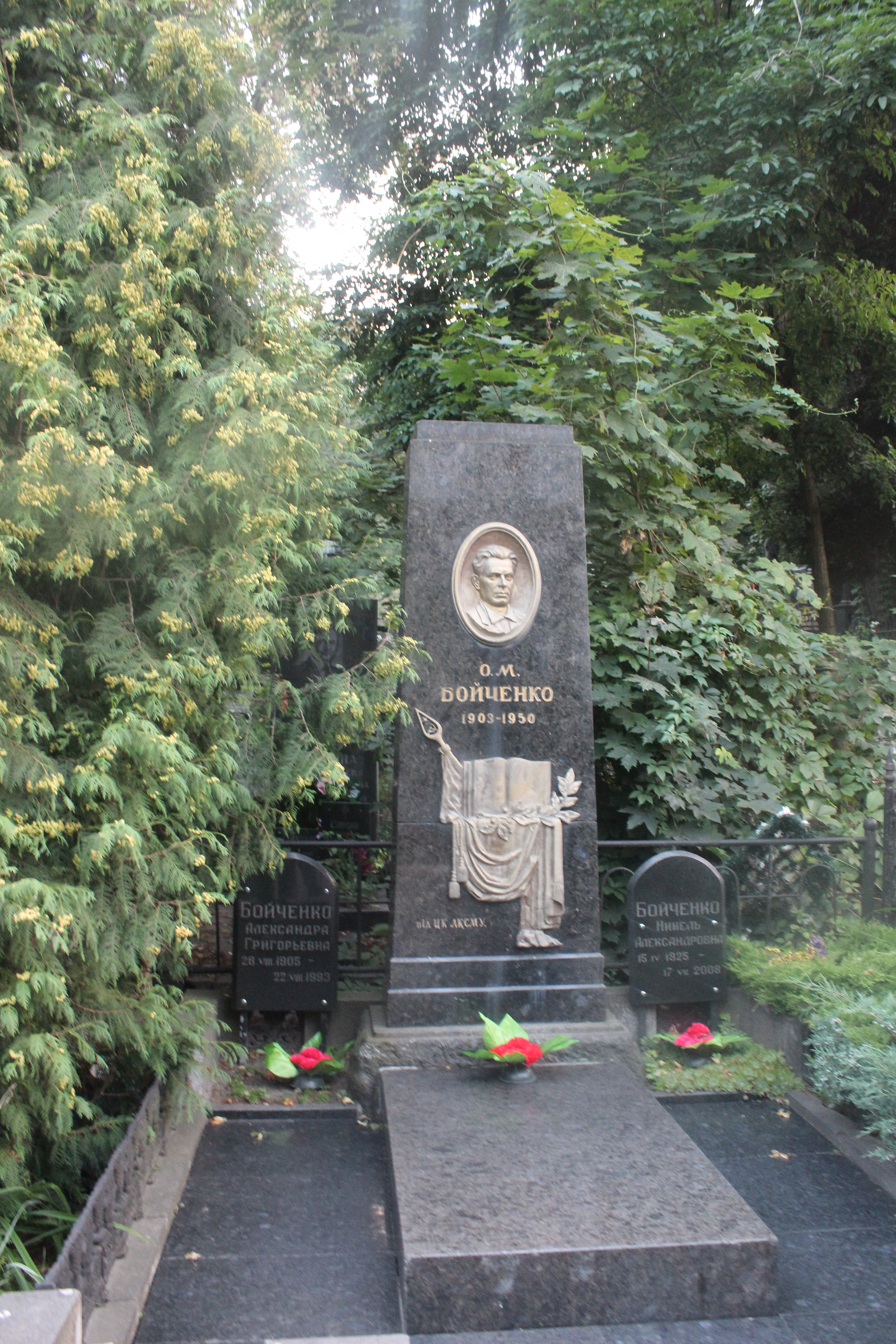 Могила письменника О. М. Бойченка, Київ, Байкова вул., 6, діл. 1